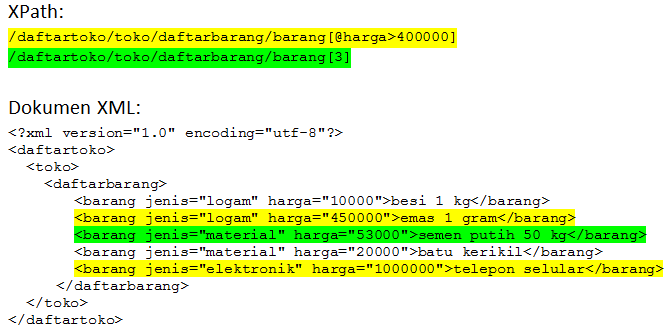 Untuk menjelaskan XPath secara sederhana